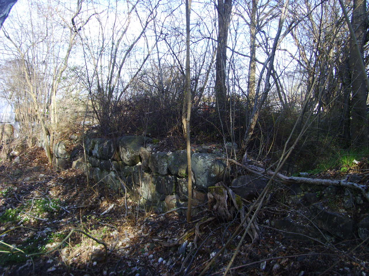 Ruiner av Bråborgs slott (1590-1719), ett kungligt slott nedbränt av ryssarna 1719. Numera en del av Kungsträdgårdens handelsträdgård på Vikbolandet i Norrköpings kommun, Östergötland.